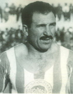 Iconic Olympiacos' player, Andreas Mouratis Ο εμβληματικός παίκτης του Ολυμπιακού, Ανδρέας Μουράτης